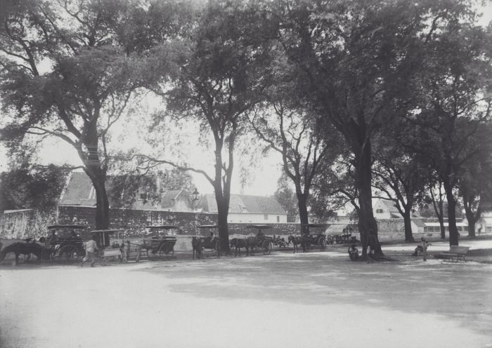 Foto. De stad Makassar bestond in de 17e eeuw uit verschillende onderdelen, waarvan fort Rotterdam er een was. Daarnaast had men de woonwijk Vlaardingen en twee aangrenzende kampongs (Kampong Melayu en Kampong Baru). Tot de val van Makassar in 1667 had het fort Ujung Pandang geheten. Toen het aan de VOC werd overgedragen, kreeg het de naam fort Rotterdam, ter ere van de geboorteplaats van Cornelis Speelman, de man die de VOC troepen had aangevoerd. Makassar heette tot voor kort Ujung Pandang ter ere van de oorspronkelijke naam van het fort in de koloniale periode. (P. Boomgaard, 2001). Rijtuigen bij Fort Rotterdam, Makassar